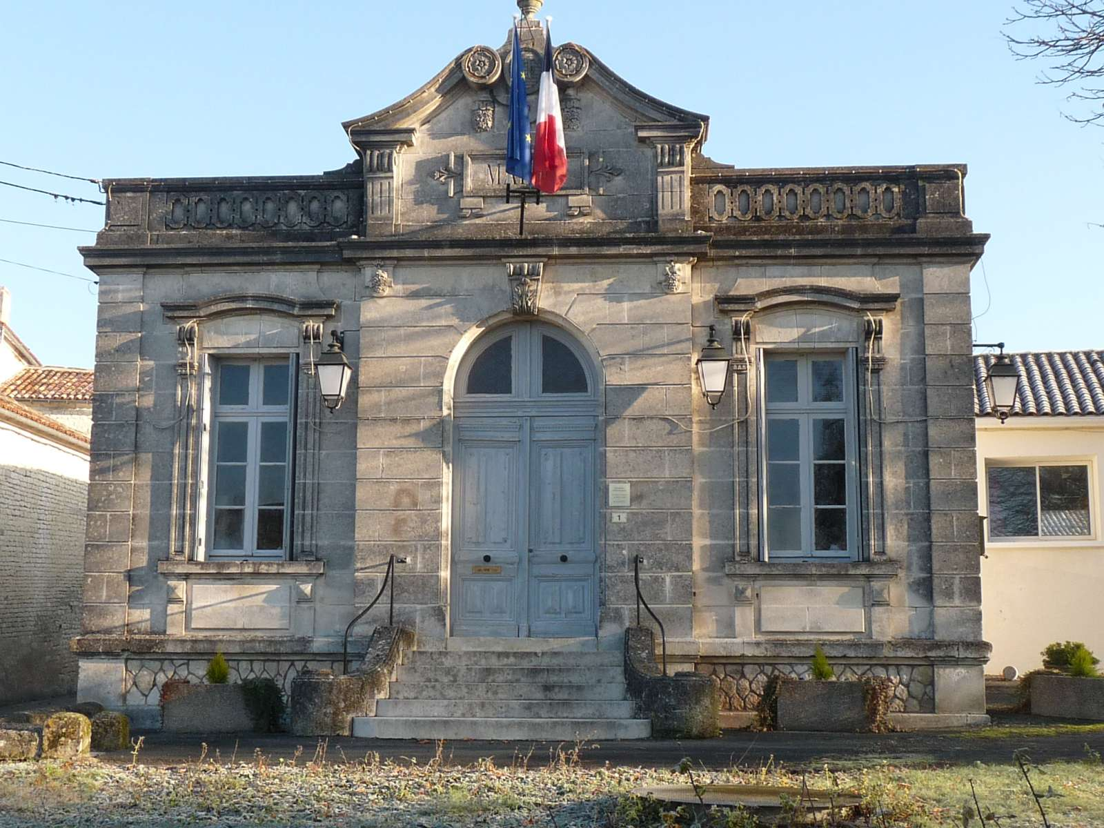 mairie de St-Fort-sur-le-Né, Charente, France